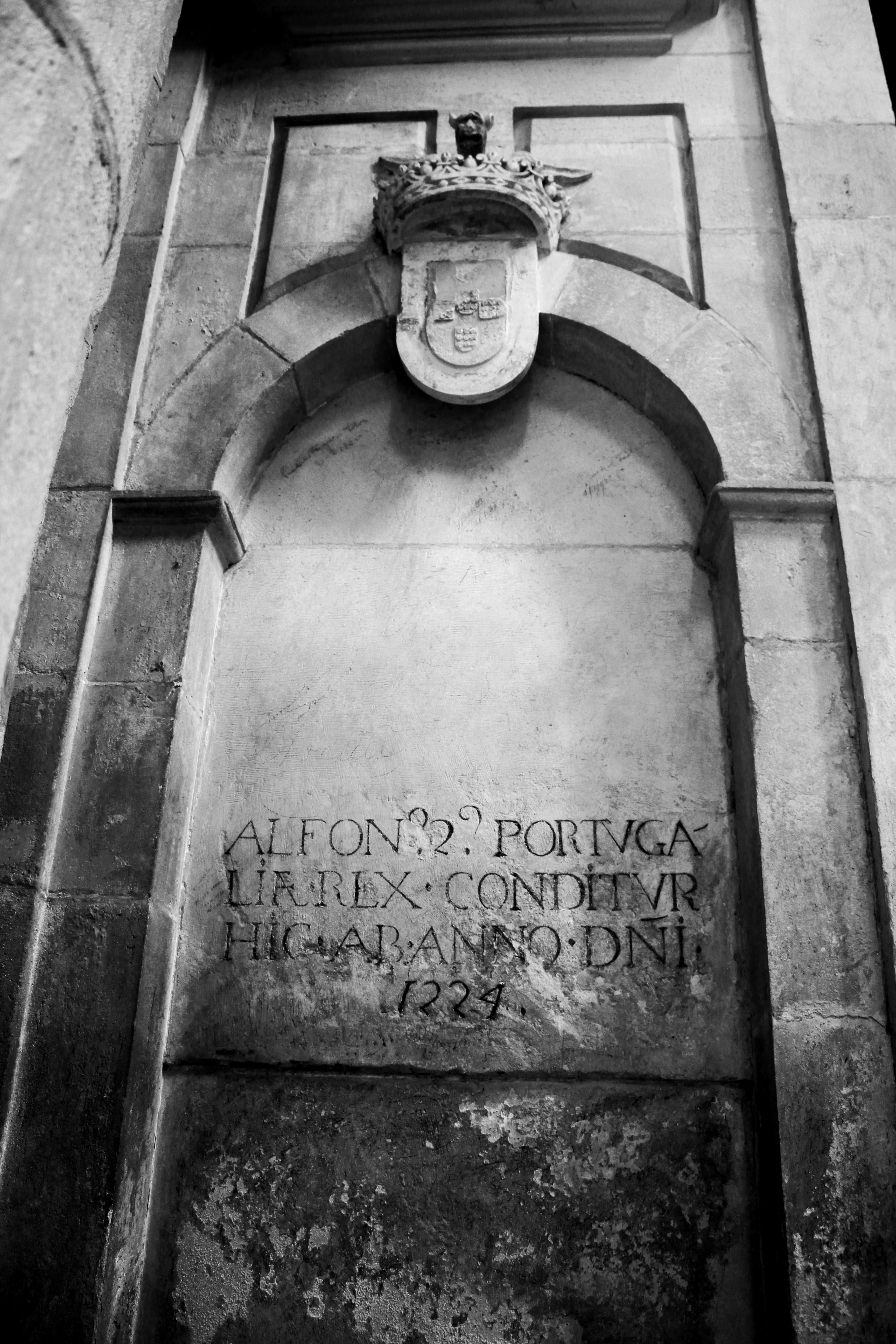 Alfonso....